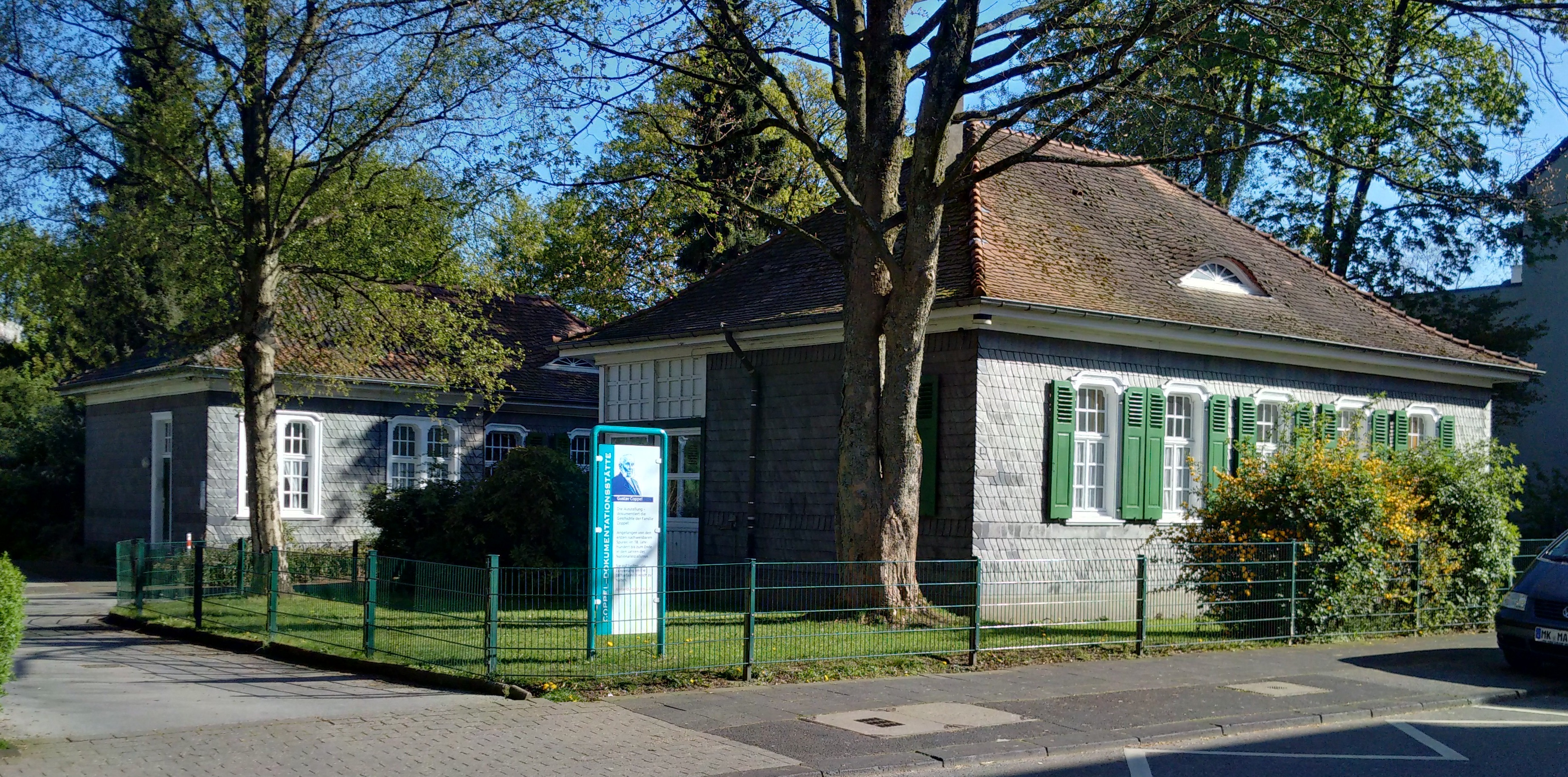 Coppelstift Solingen, aufgenommen im Frühling 2016